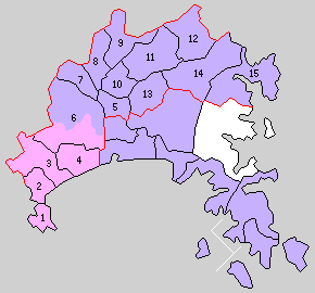 宮城県桃生郡の町村。